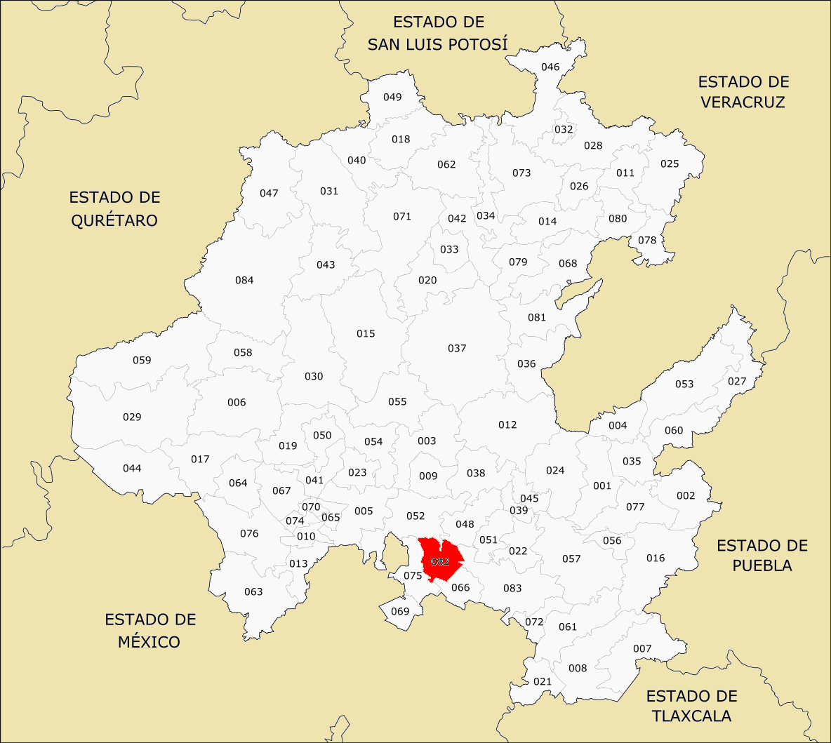 Municipios de Hidalgo